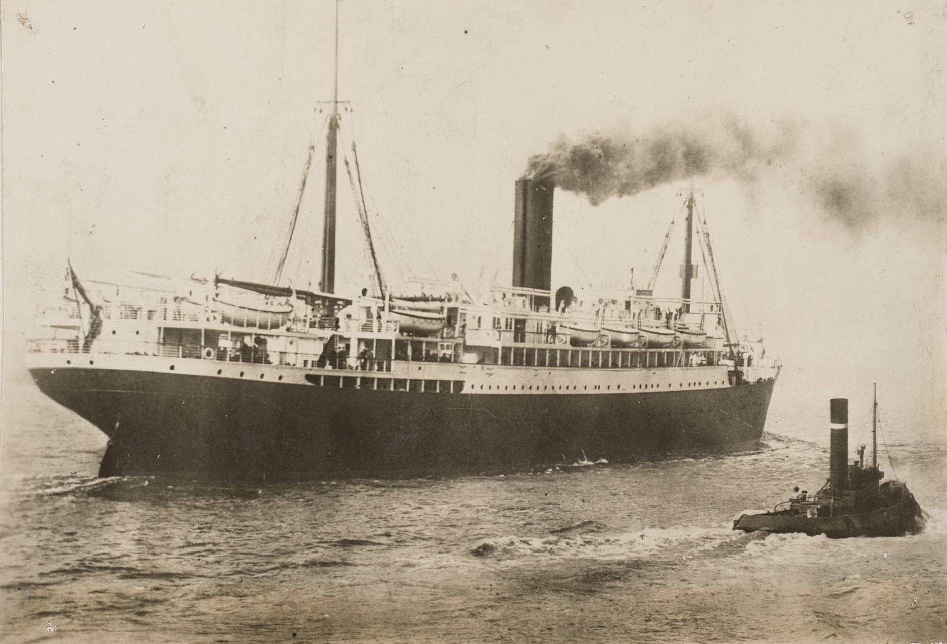 Le paquebot « Appam » qui a été capturé par un corsaire allemand.